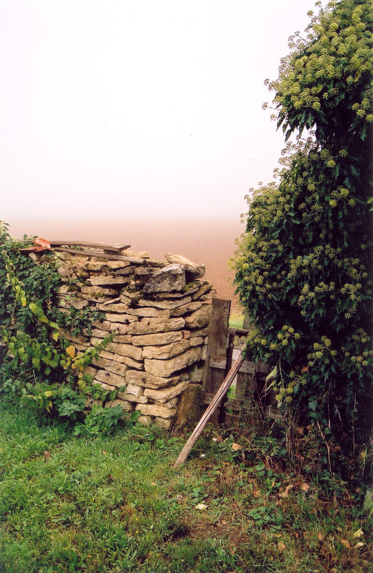 vue sur les "derrières"